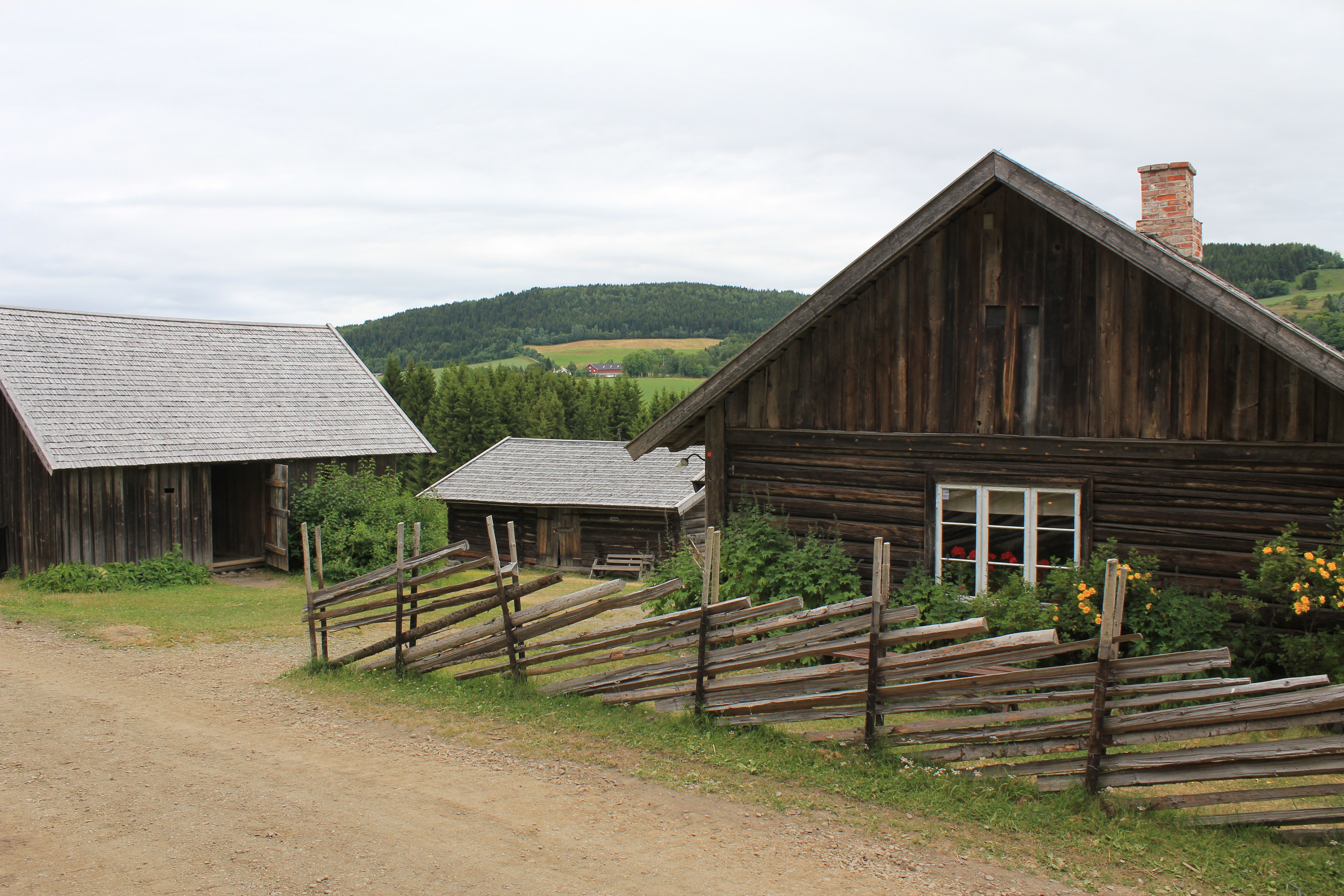 Prøysenstua på Ringsaker